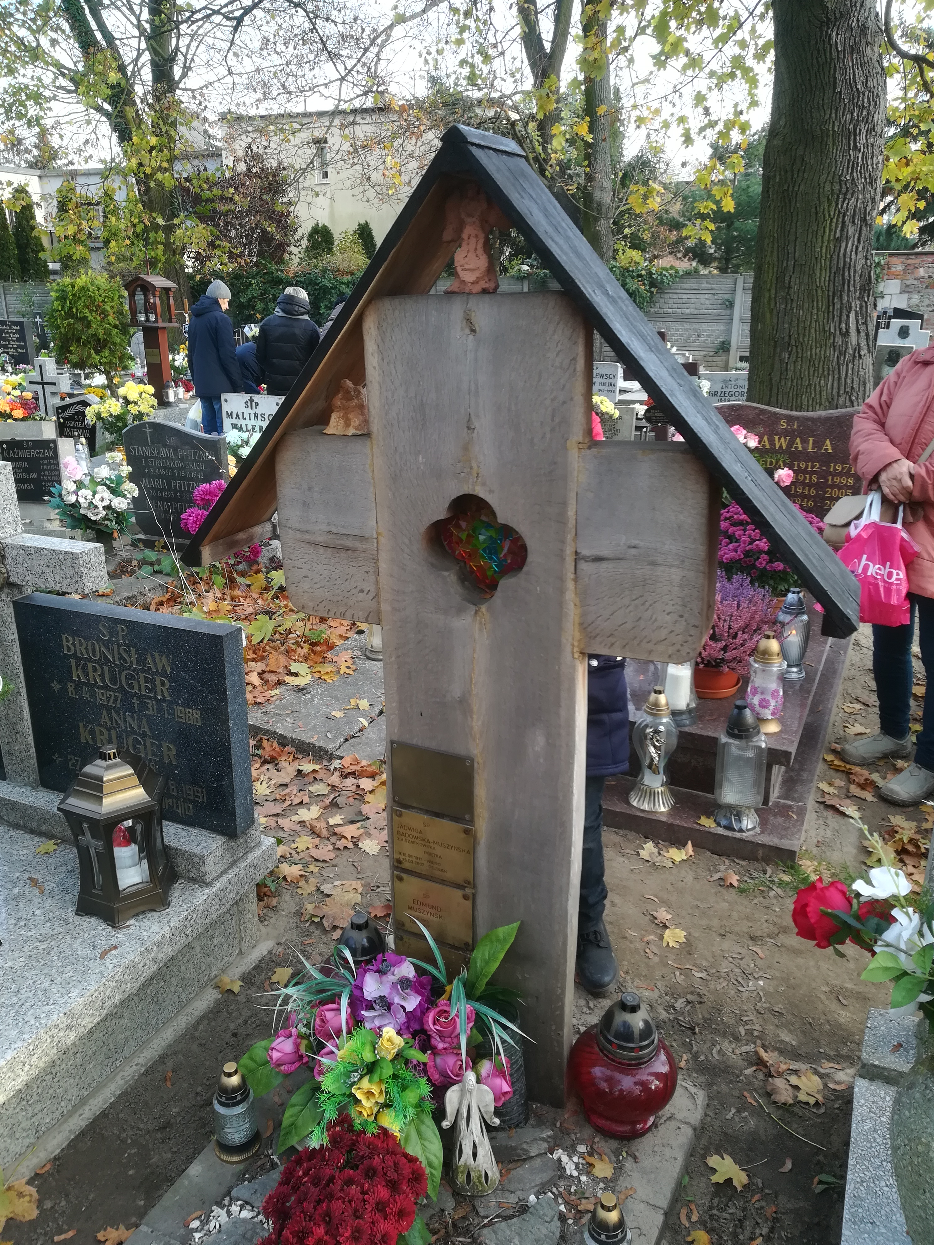 Grób Jadwigi Badowskiej-Muszyńskiej na cm. górczyńskim w Poznaniu.